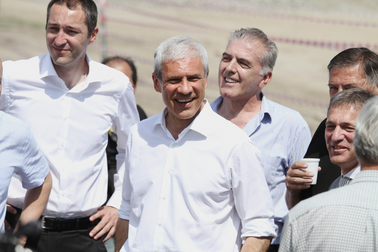 Kandidat za predsednika Srbije i predsednik Demokratske stranke Boris Tadić obišao je početak radova na izgradnji železničko-drumskog mosta preko Dunava u Novom Sadu. (12. maj 2012); Foto servis DS